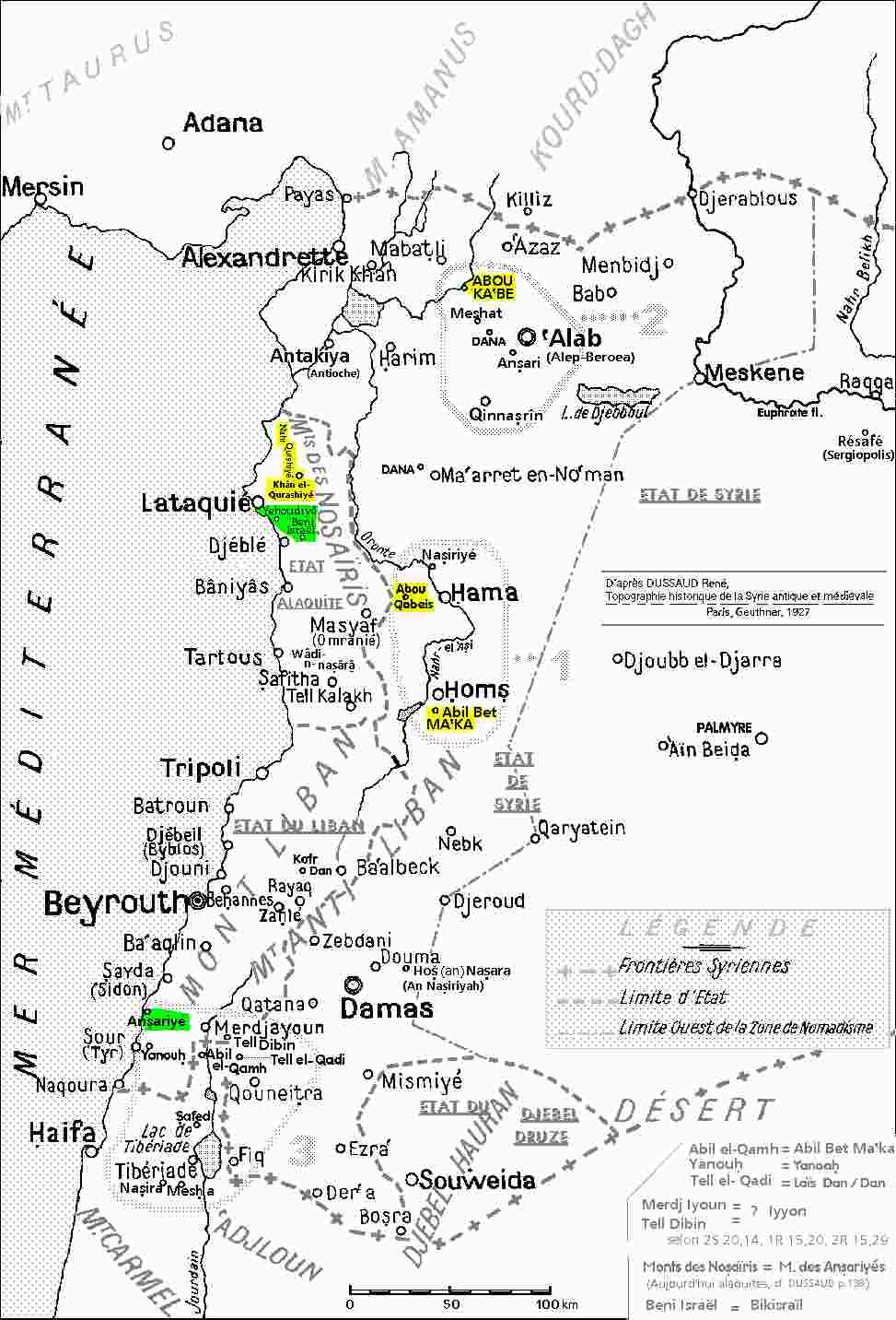 Province romaine de Syrie vers le début de l'ére chrétienne d'après René Dussaud (1927)